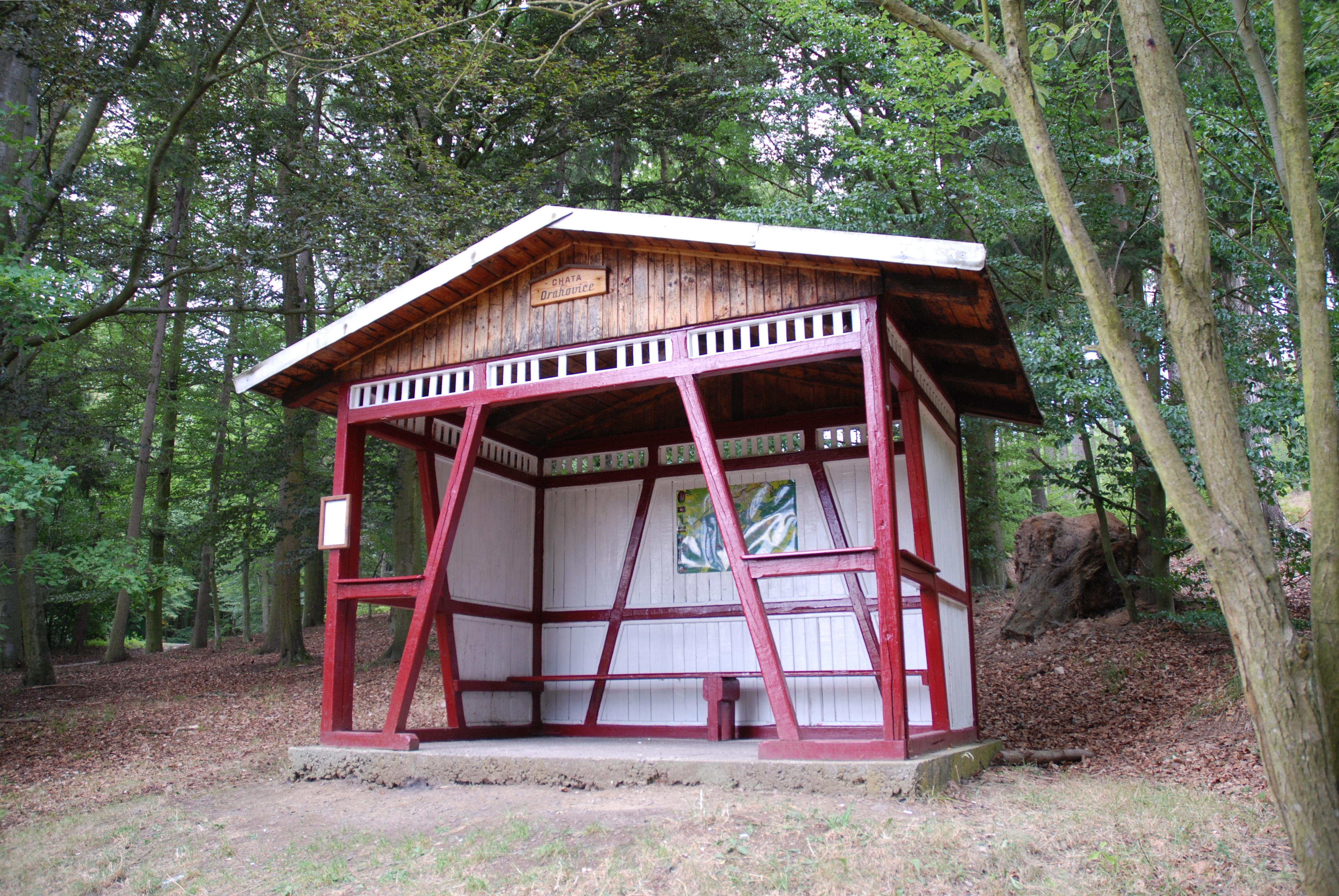 Chata Drahovice v Karlovarských lázeňských lesích v městské části Drahovice